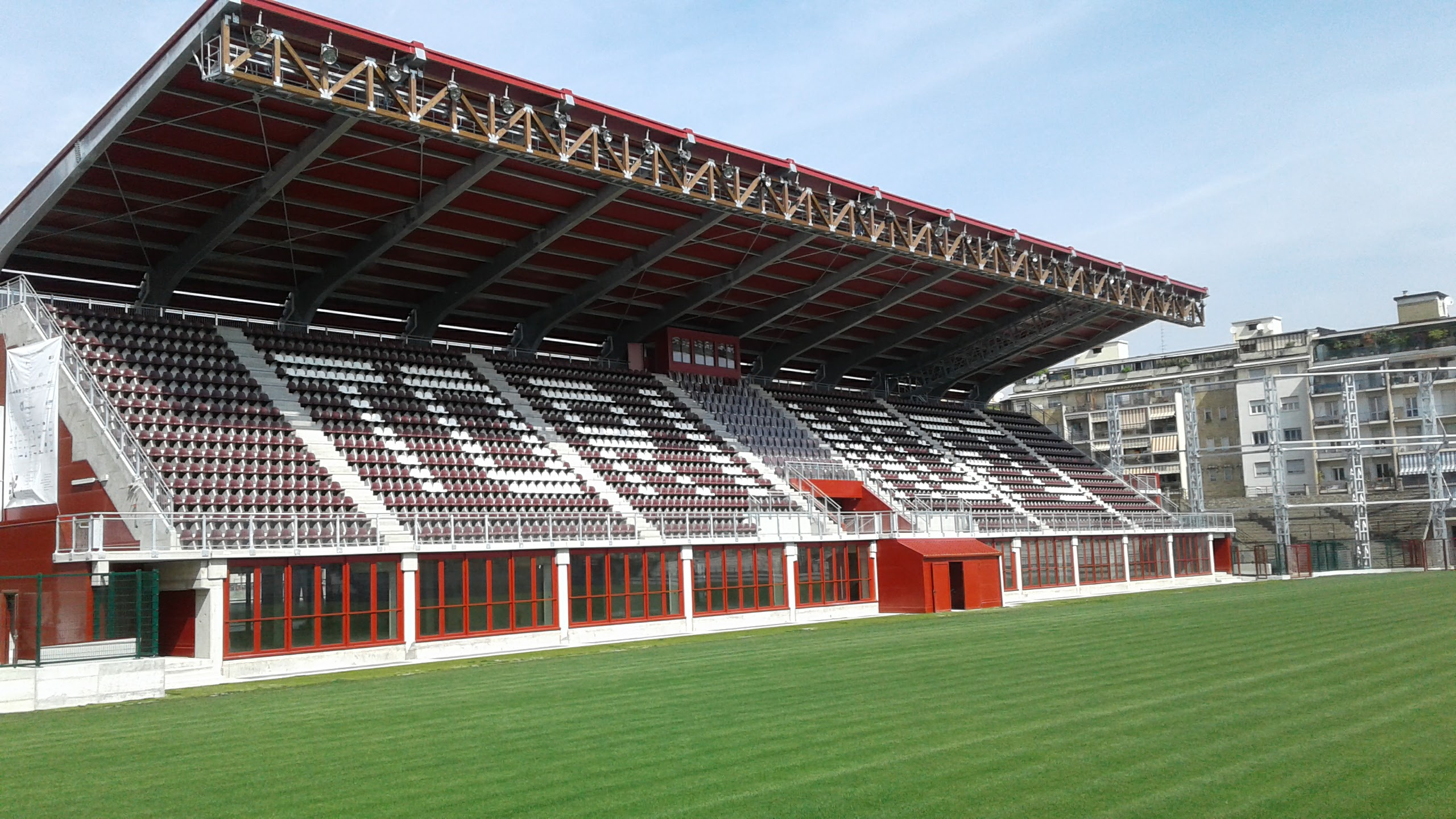 La tribuna coperta del nuovo Stadio Filadelfia